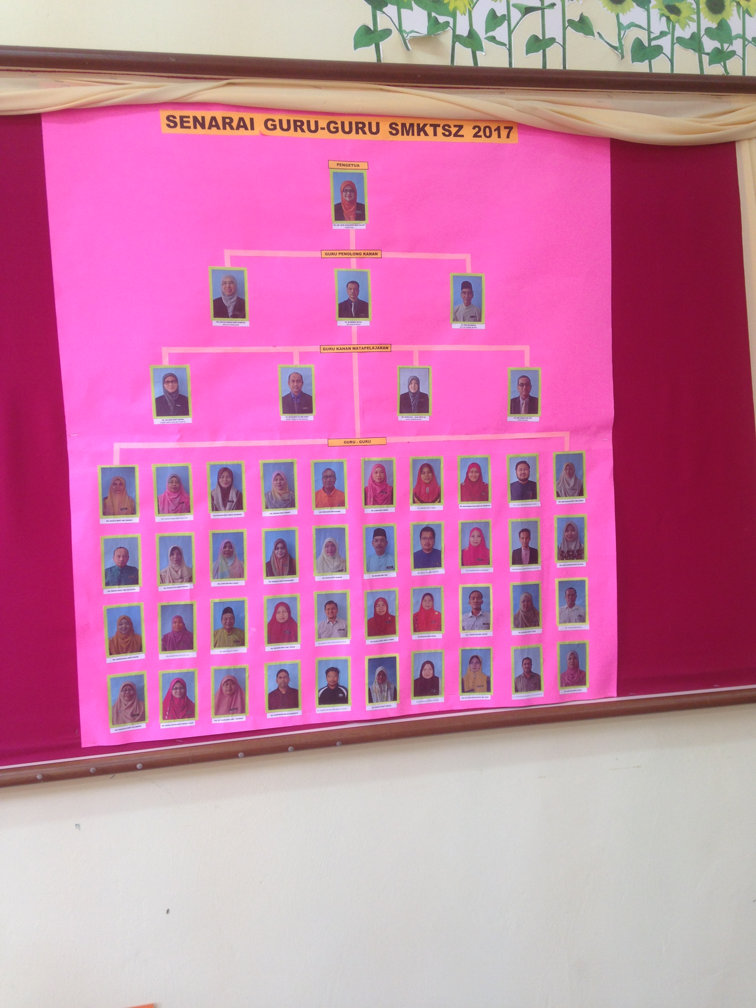 GURU SMKTSZ